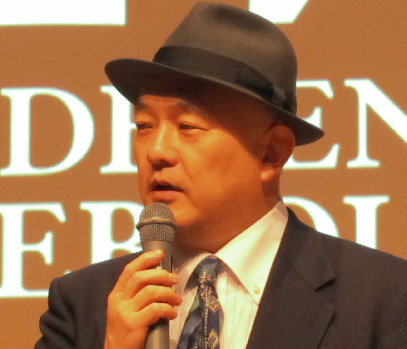 題名：司会中のIWJ代表岩上安身氏 場所：「饗宴IV」Grand Hall(品川) 日時：2013年12月22日(日)